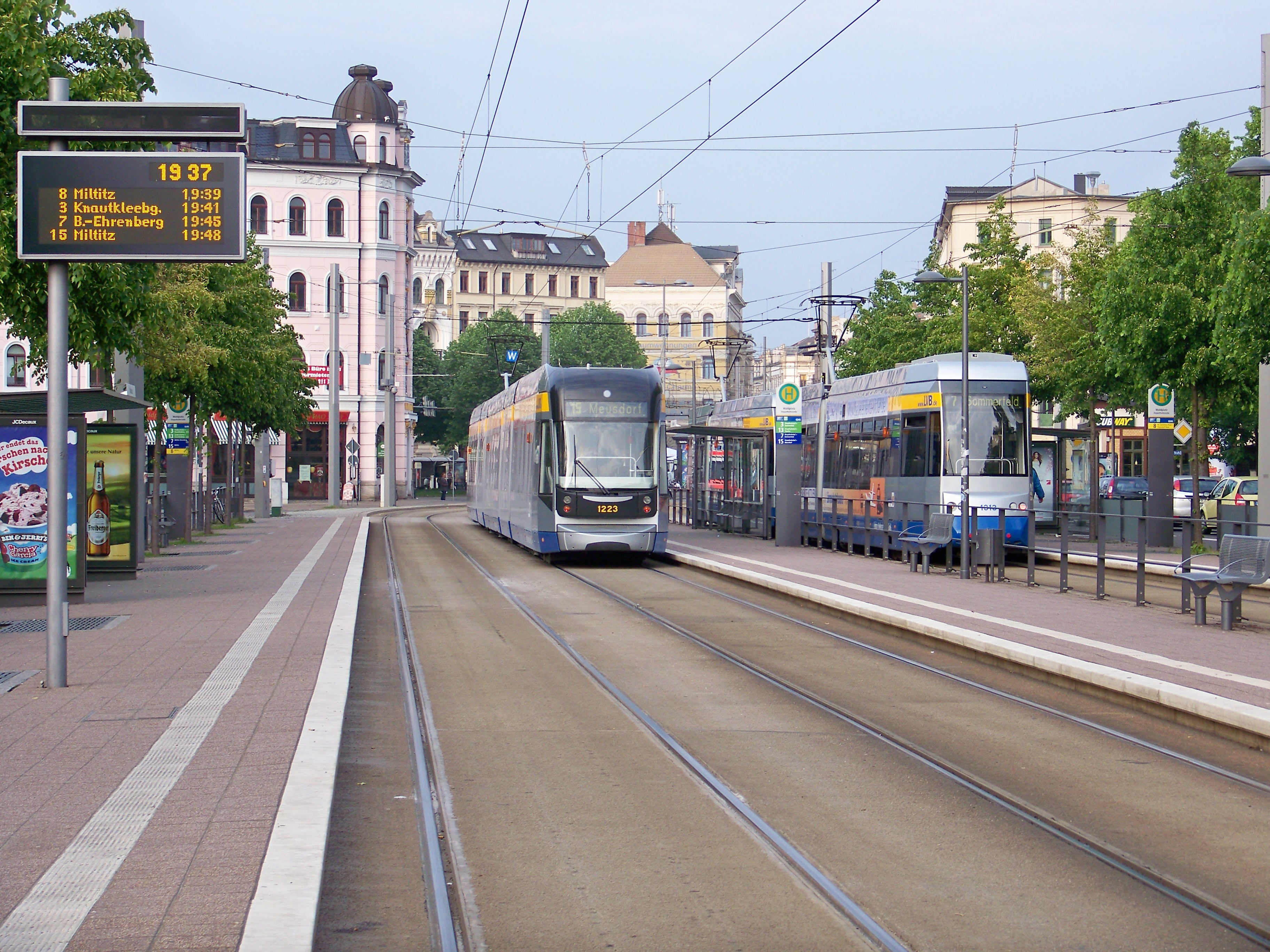 Triebwagen 1223 des Typs NGT12-LEI auf der Linie 15 (Miltitz–Meusdorf) fällt an der Haltestelle Waldplatz aus und blockert die Fahrspur Richtung Leibnizstraße, weshalb die Linie 7 (Böhlitz-Ehrenberg–Sommerfeld, rechts) über Westplatz umgeleitet werden muss.